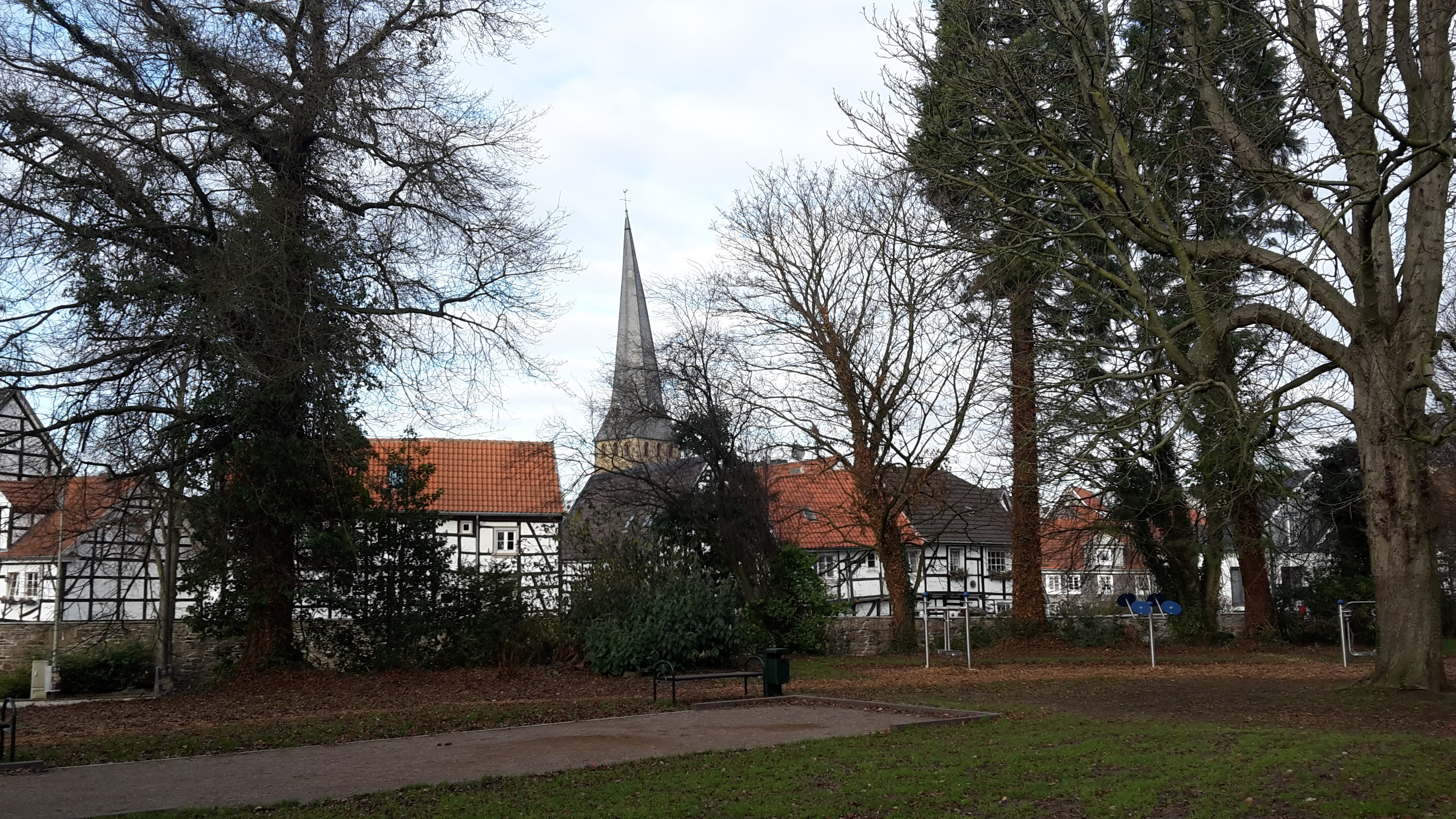 Blick auf die Altstadt vom Hillpark in Hattingen